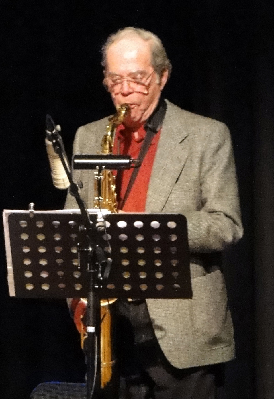 Joki Freund als Mitglied der All Star Band, auf dem Hofheimer Jazz Festival 2009.